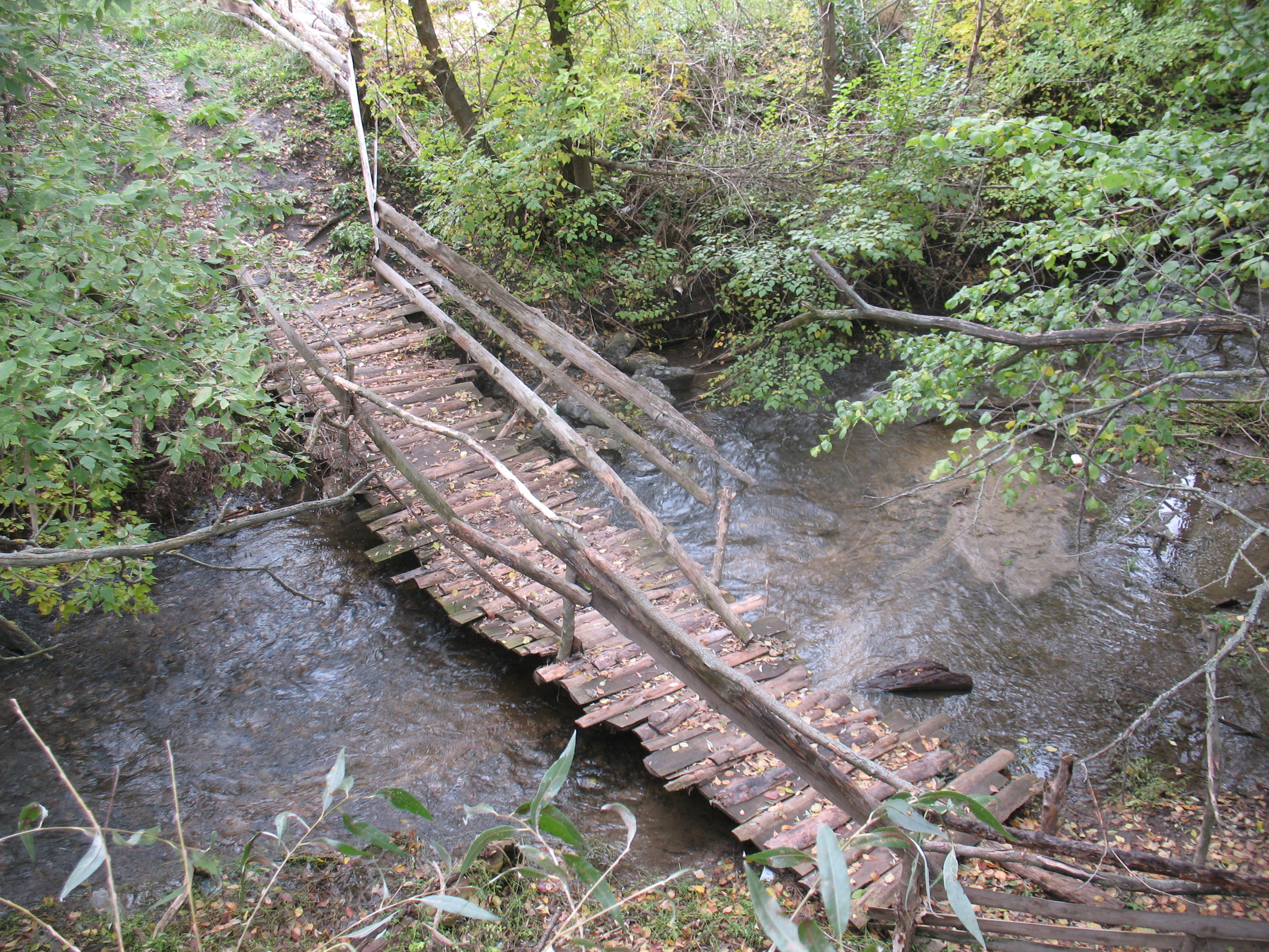 Река Бахтин, Харьковская область, село Червоный Оскол